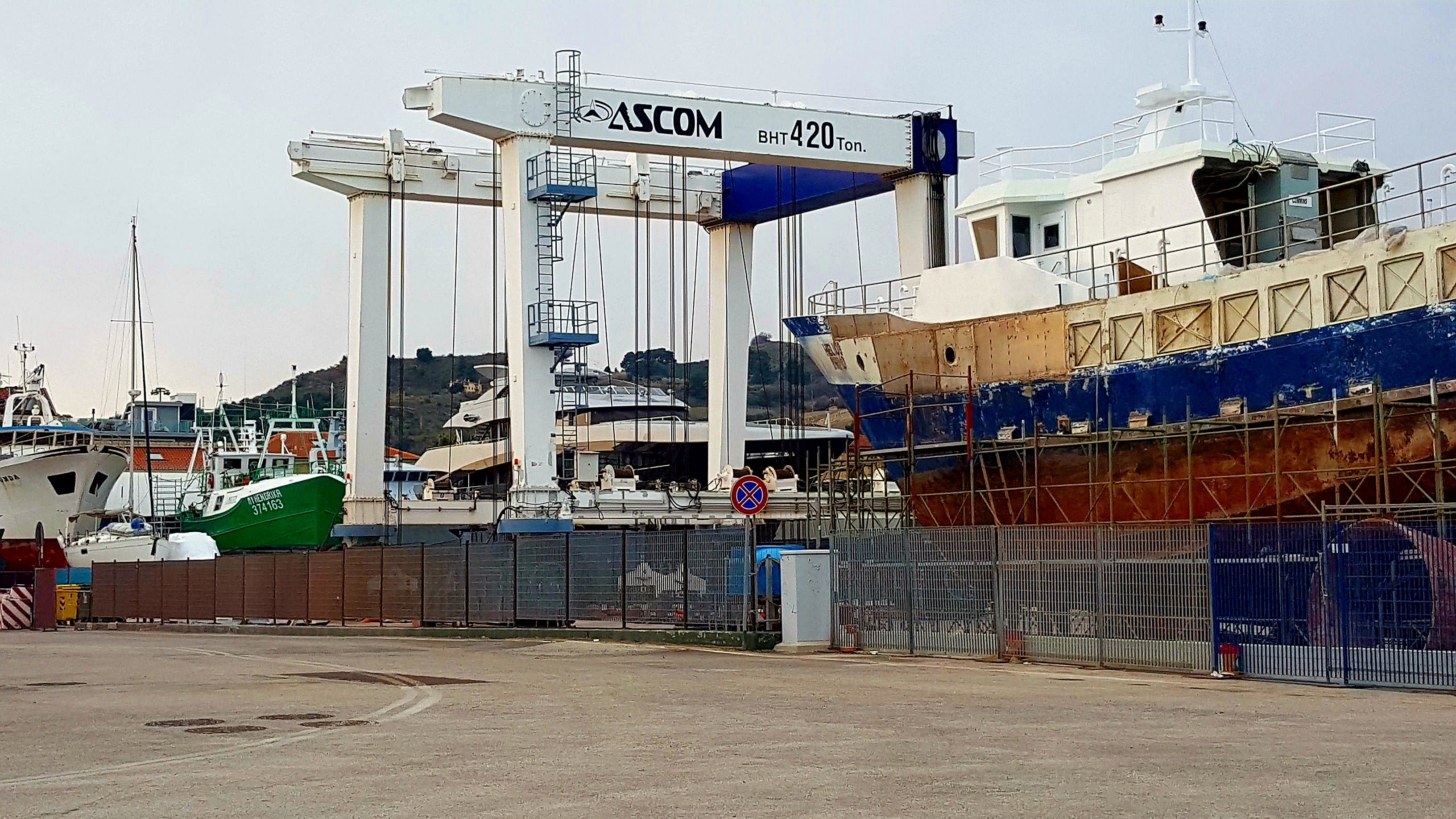 San Benedetto del Tronto, scorcio dell'area attrezzata a cantiere navale nel zona portuale.